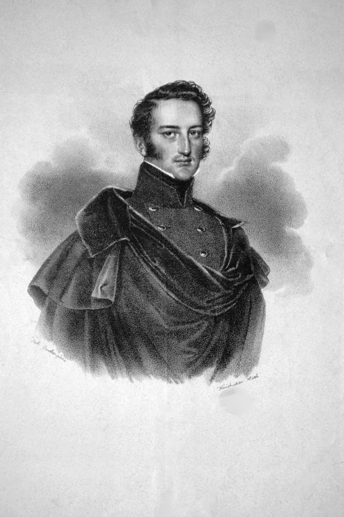 Friedrich Karl Fürst Schwarzenberg (1800-1870), k. k. Generalmajor, Schriftsteller. Lithographie von Josef Kriehuber, s.a. Nach Joh. Ender